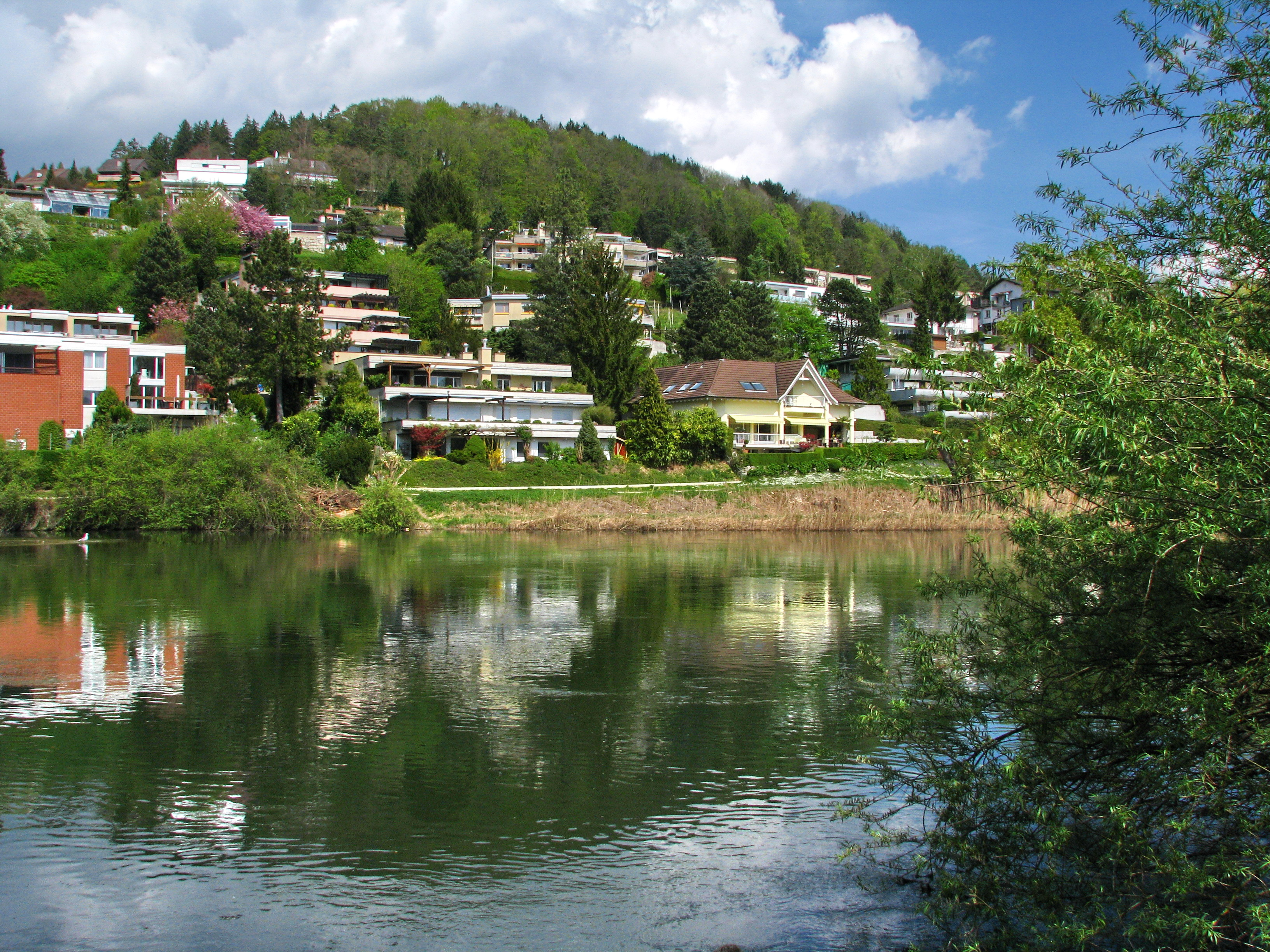 Limmat in Oetwil an der Limmat